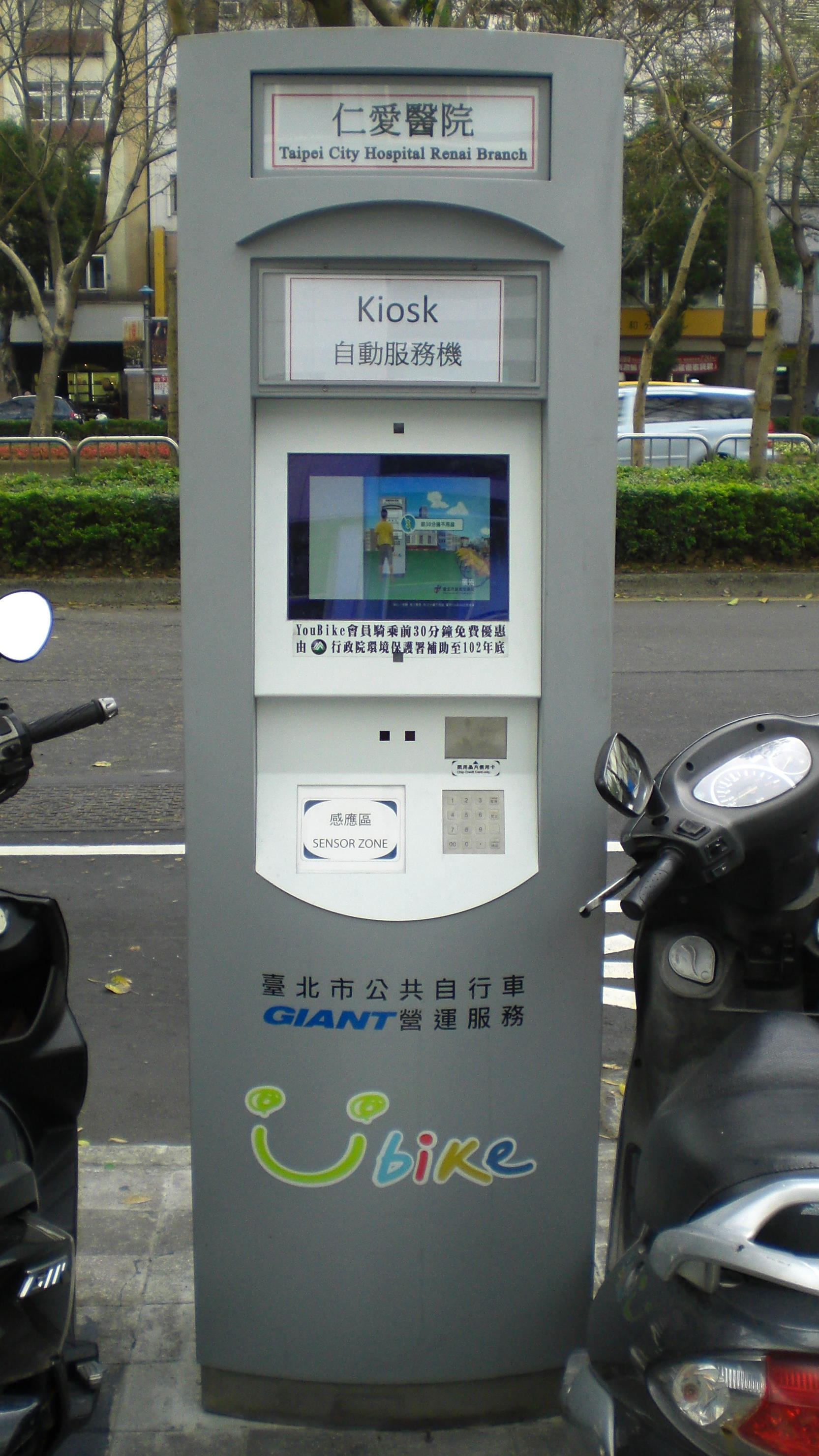 臺北市立聯合醫院仁愛院區前人行道上，臺北市公共自行車租賃系統仁愛醫院自動服務機。